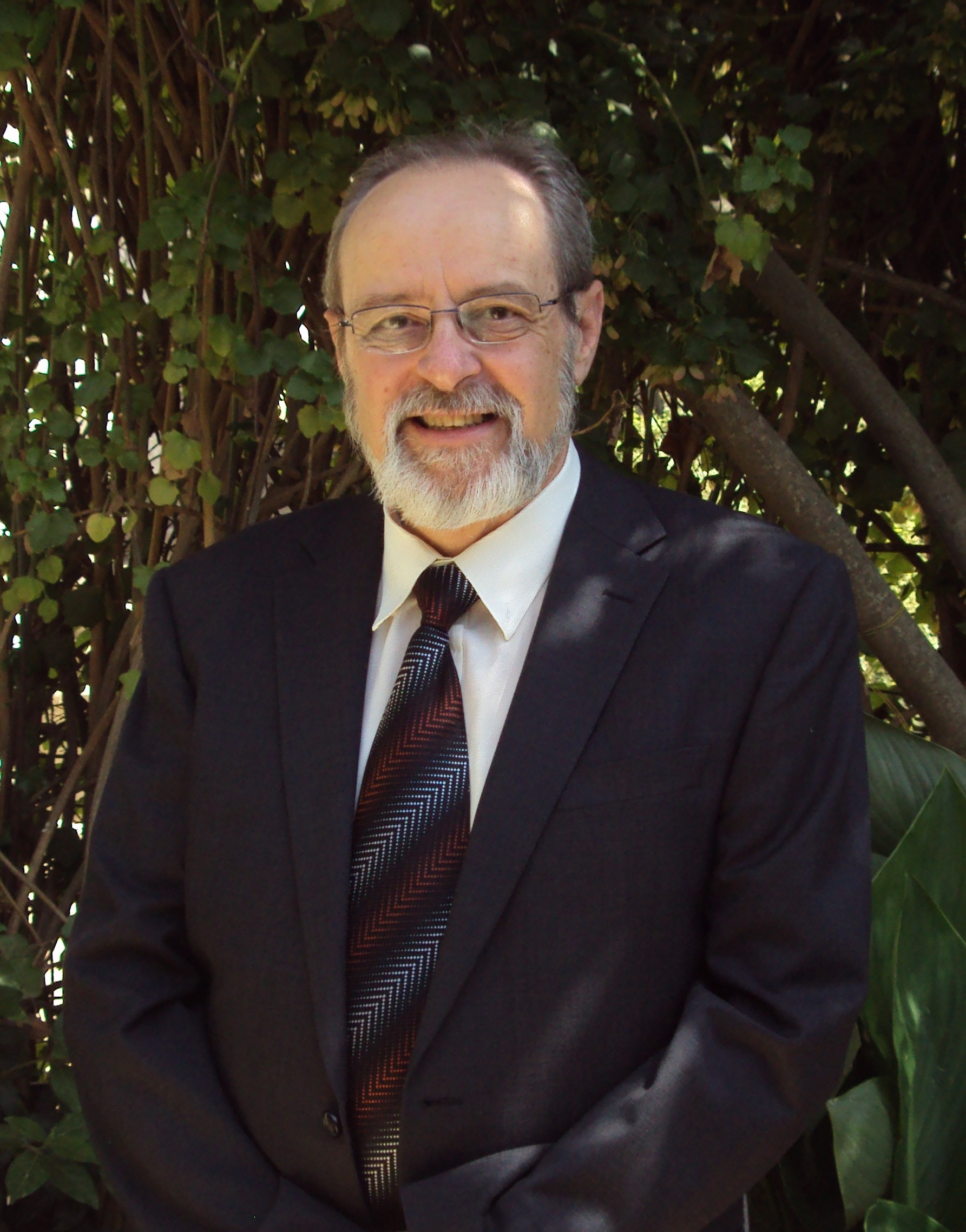 פרופ' שמואל גליק Shmuel Glick